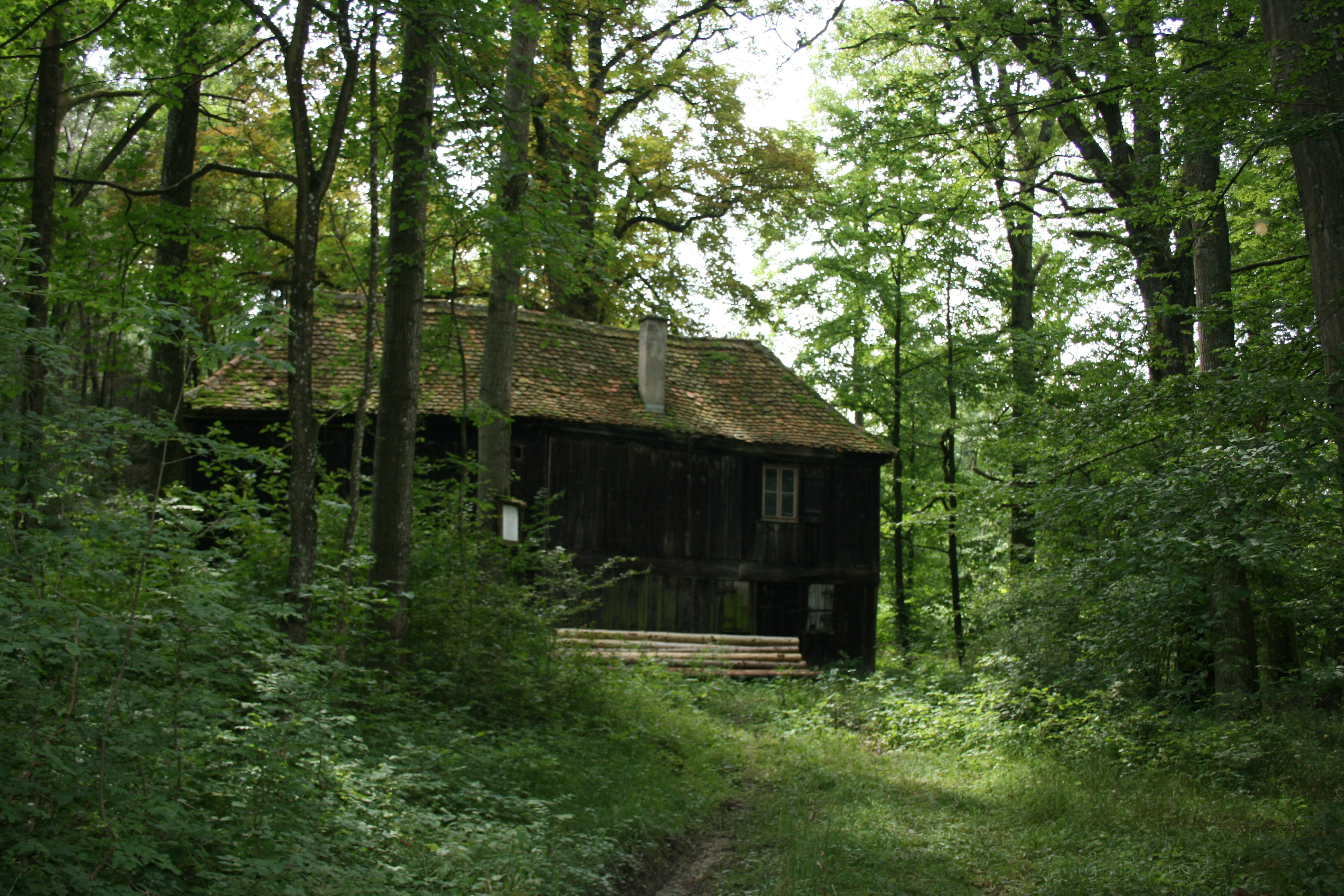 Waldhaus Agnes Günther Langenburg